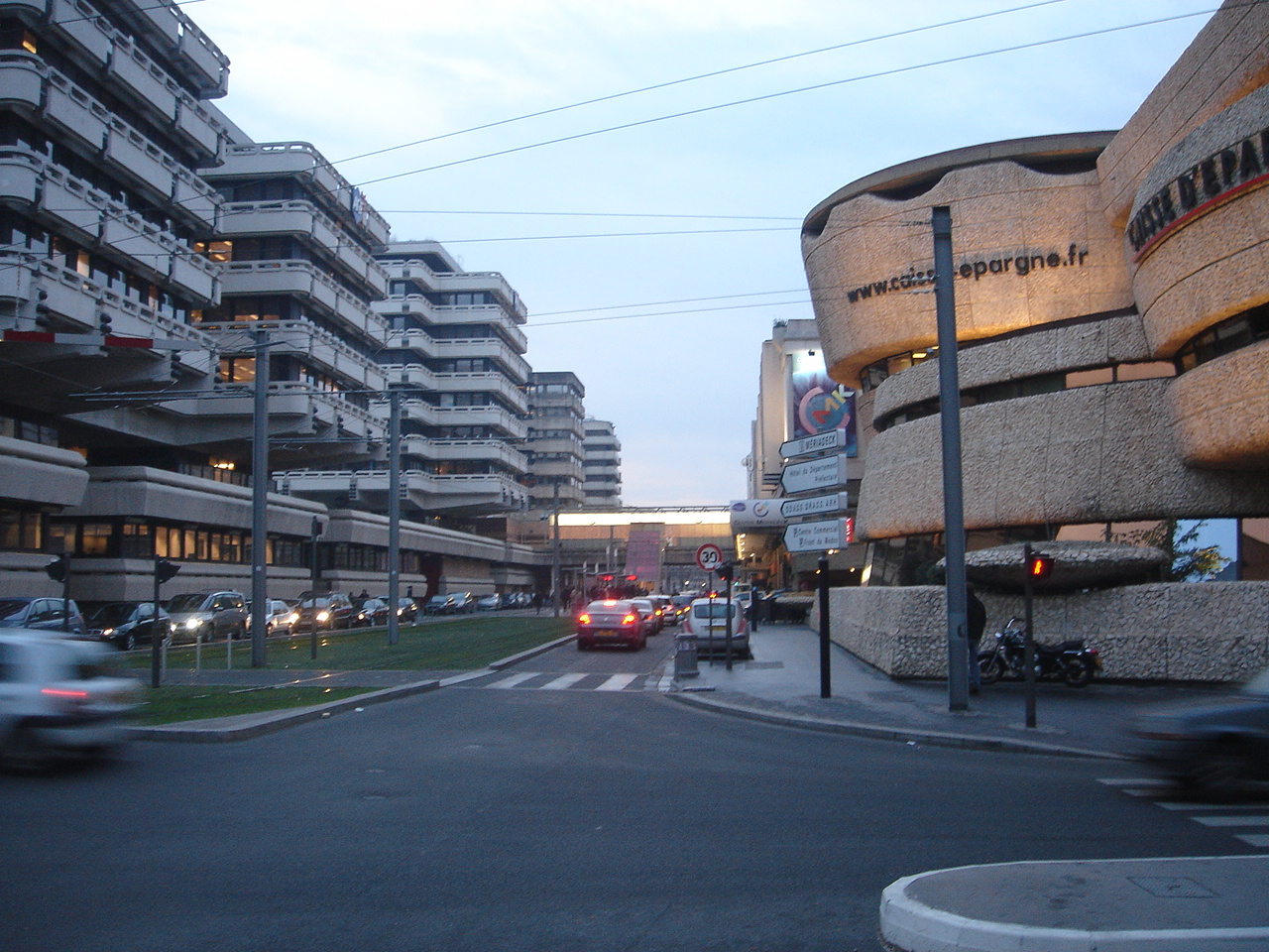 Le quartier de Mériadeck à Bordeaux, France.